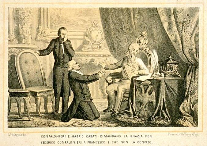 "Il conte Vitaliano Confalonieri e Gabrio Casati domandano la grazia a Francesco I, che non la concede".